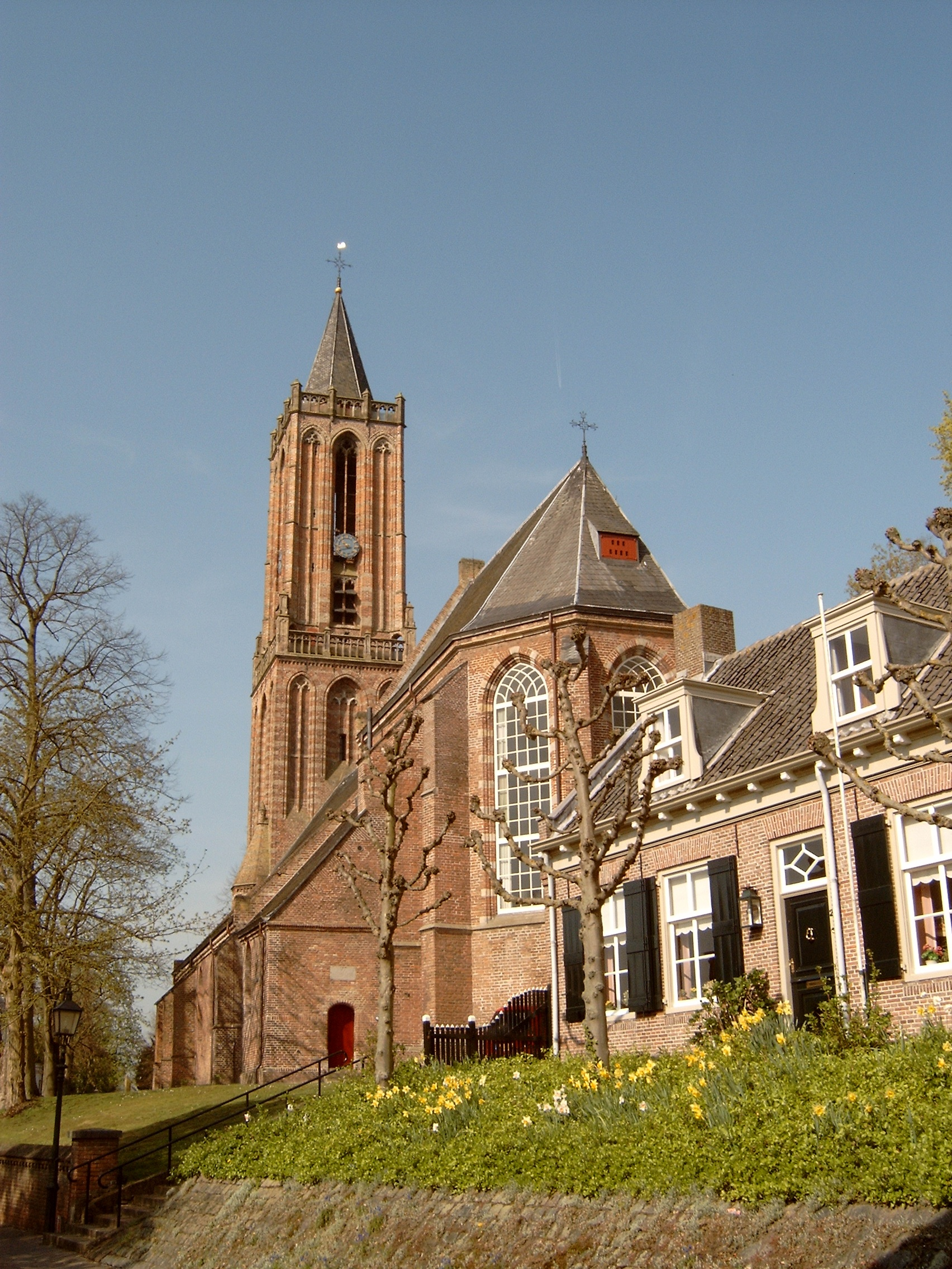 Amerongen, kerk